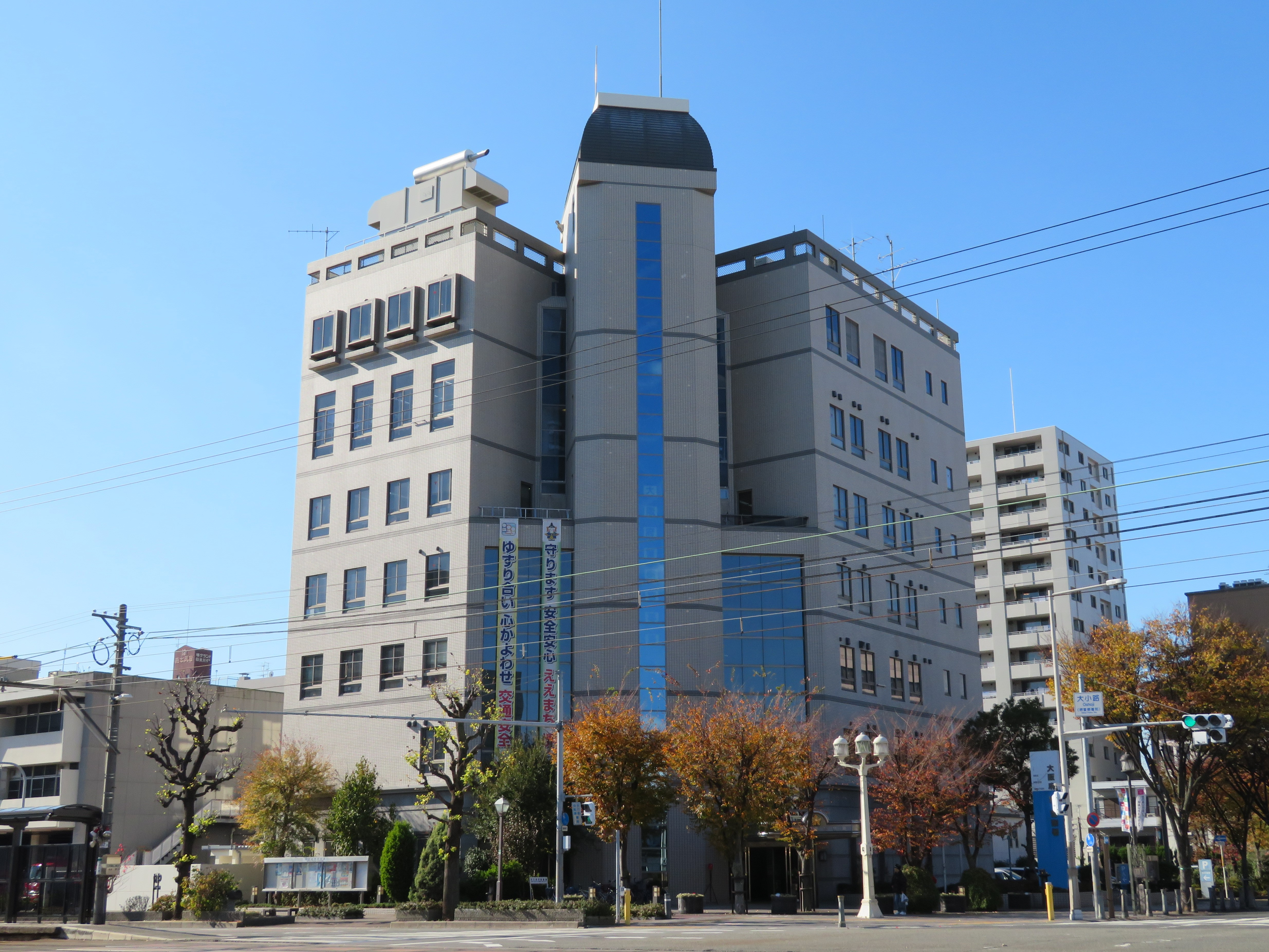 大阪府堺警察署